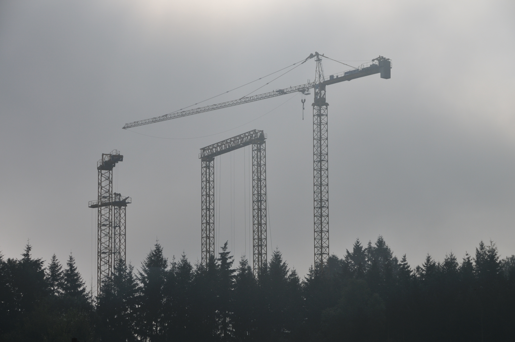 Grues de chantier, La Clayette, Saône-et-Loire, France